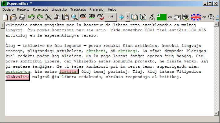 Esperantilo 0.9833 on Windows XP